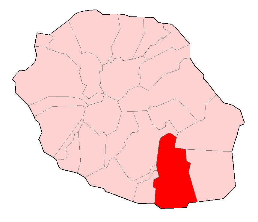 Carte de la Réunion permettant de localiser Saint-Joseph.